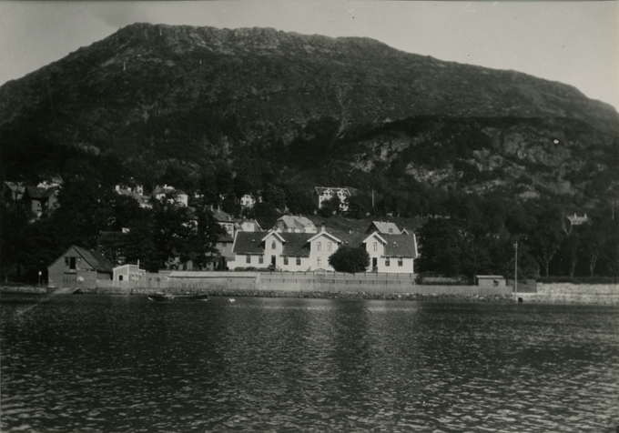 Bildet er hentet fra arkivet etter Møllendal asyl, oppbevart ved Bergen Byarkiv.